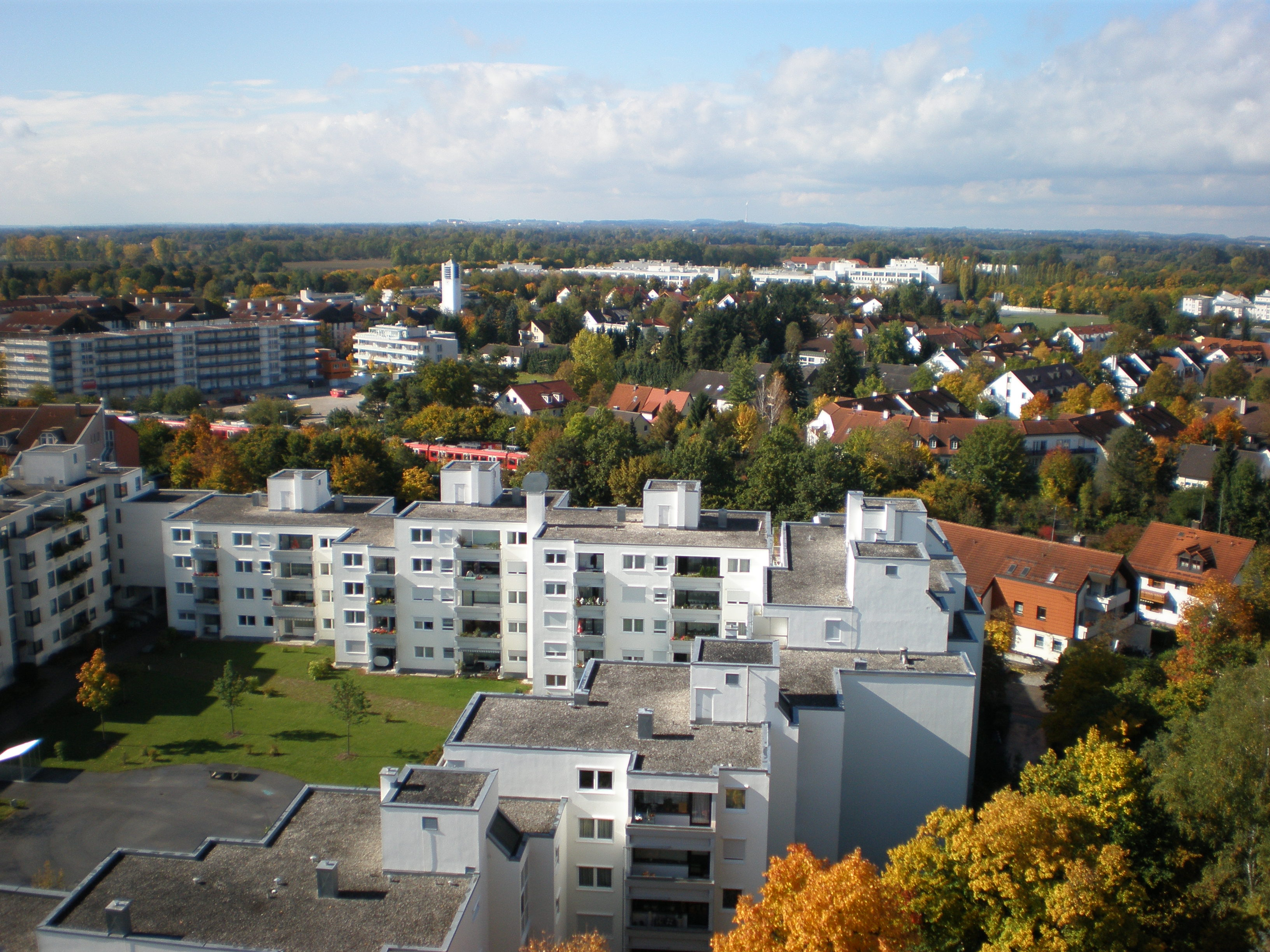 Unterschleißheim 15.10.2013